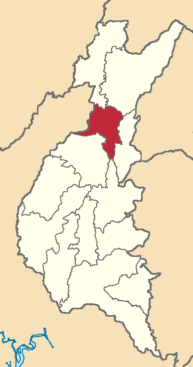 Mapa localizador del cantón en Los Ríos, Ecuador